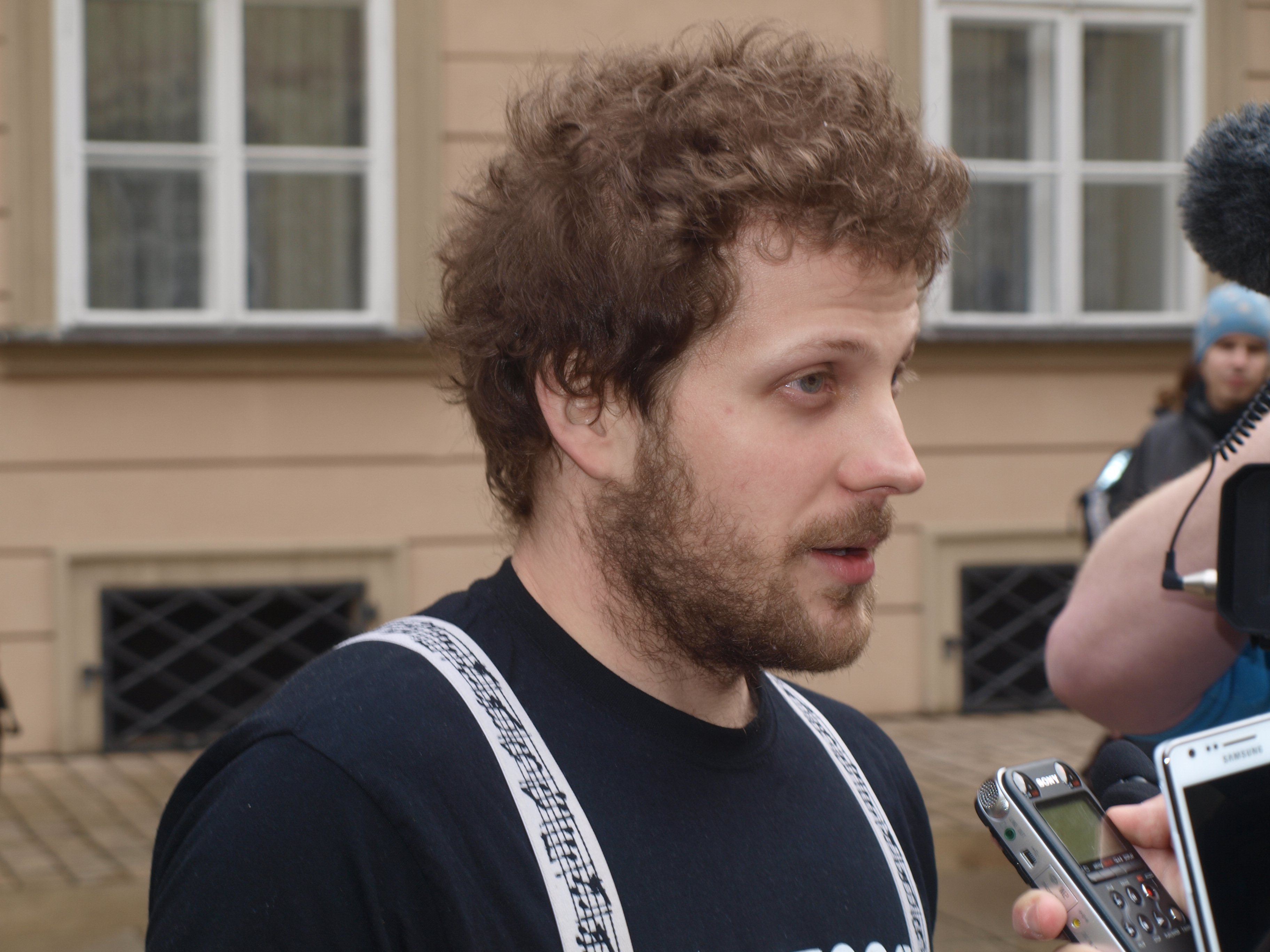 Iniciativa Žít Brno a její happening na nádvoří brněnské nové radnice, kde členové tohoto sdružení ohlásili svou kandidaturu v nadcházejících komunálních volbách